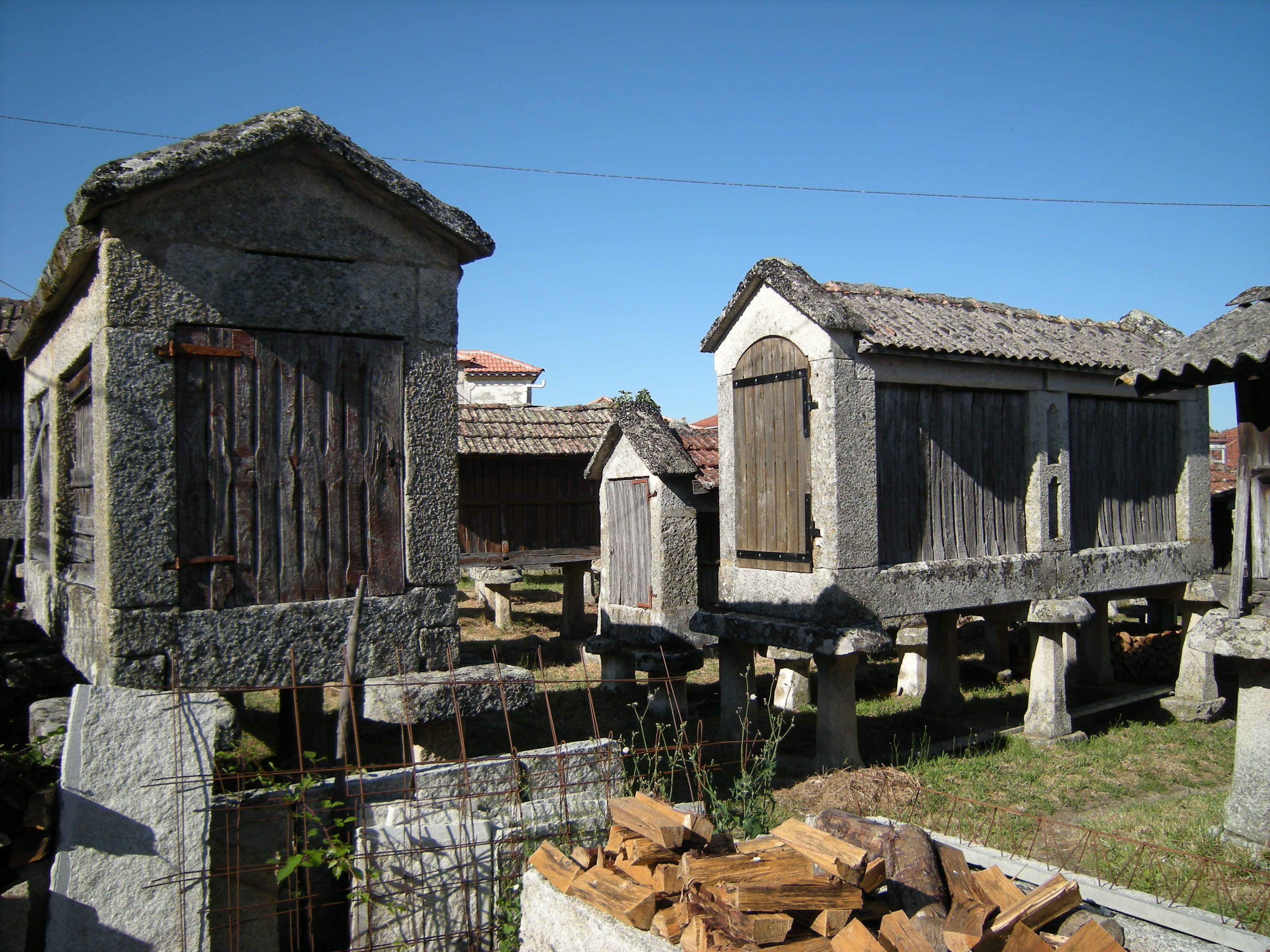 Hórreos de Muimenta, Carballeda de Avia, Galicia